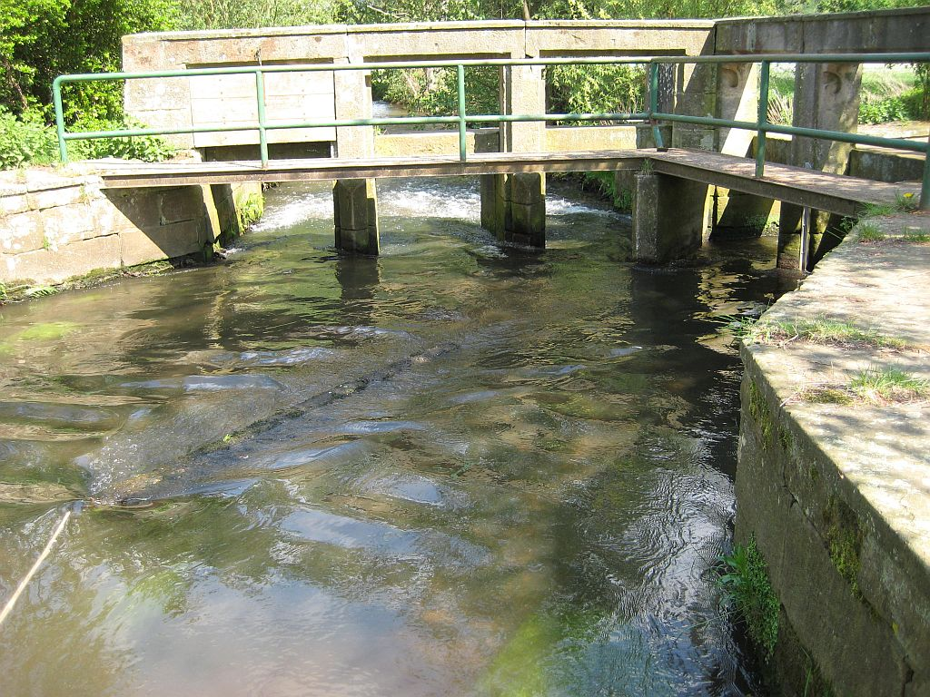 Abzweigung des Spiegelbach von der Queich